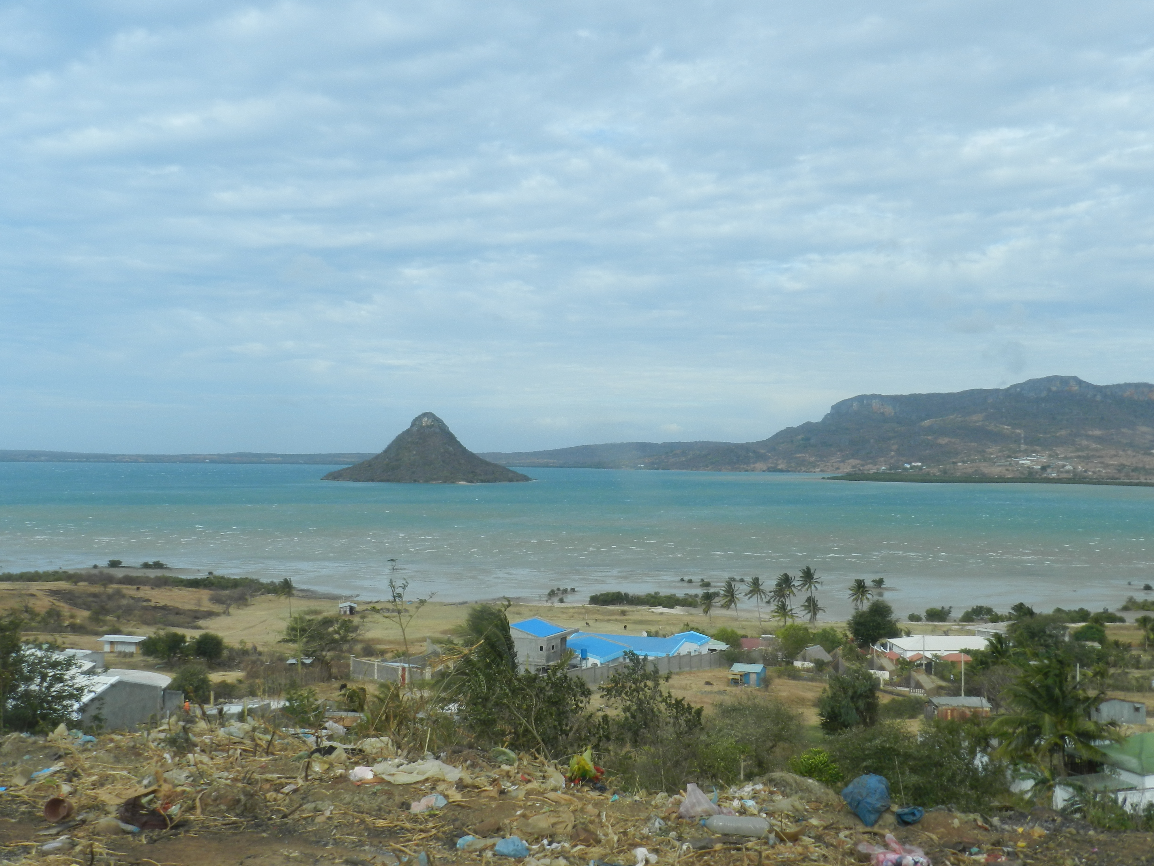 Caratteristico Pan di Zucchero nella baia di Diego Suarez